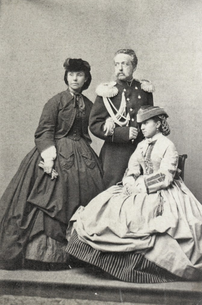 Князь Григорий Григорьевич Гагарин (1810—1893) с женой княгиней Софьей Андреевной, ур. Дашковой (1822—1908) и дочерью Екатериной (1845—1920)